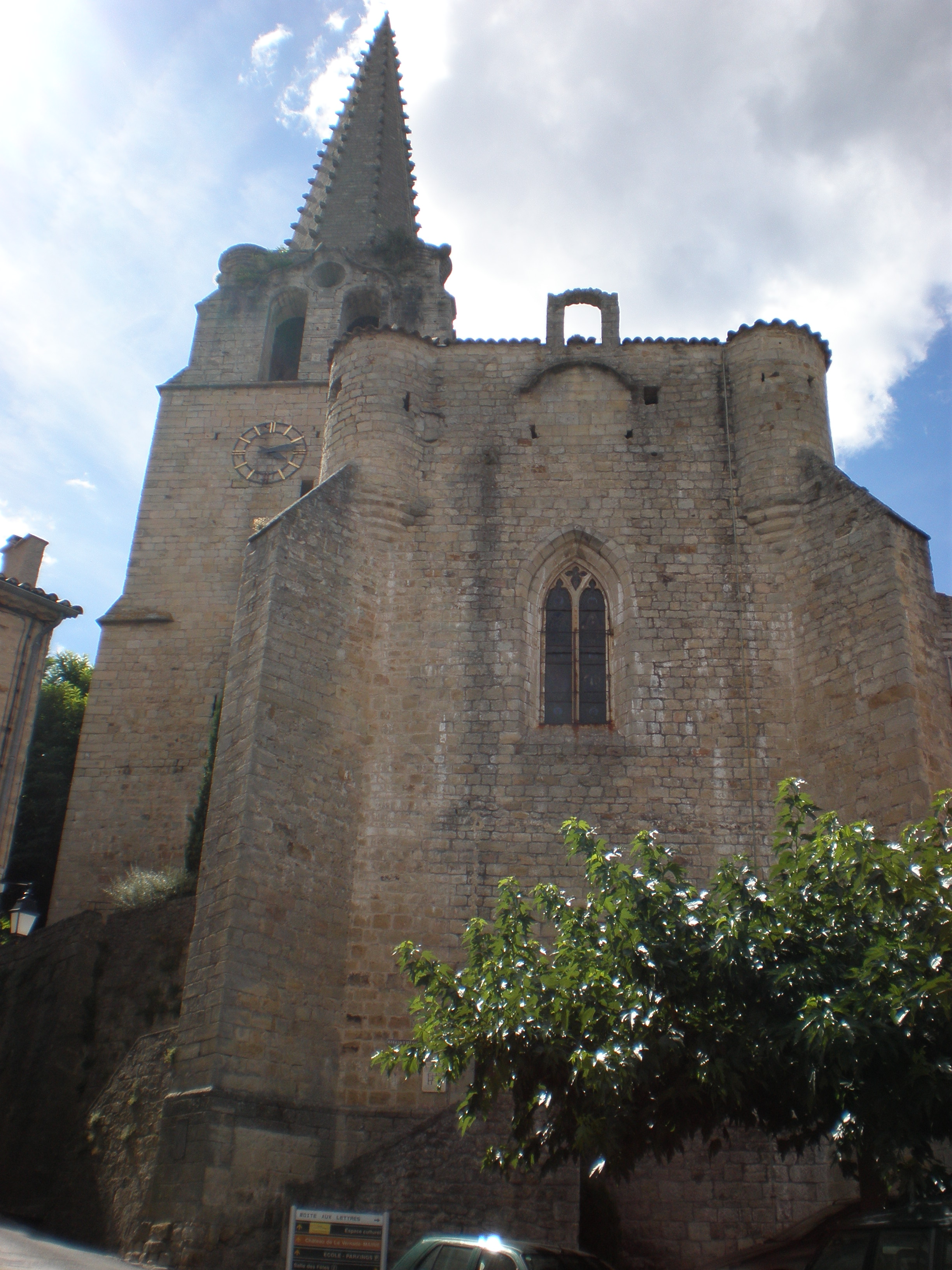 Église de Chassiers (Ardèche). Classée monument historique par arrêté du 14 avril 1909.